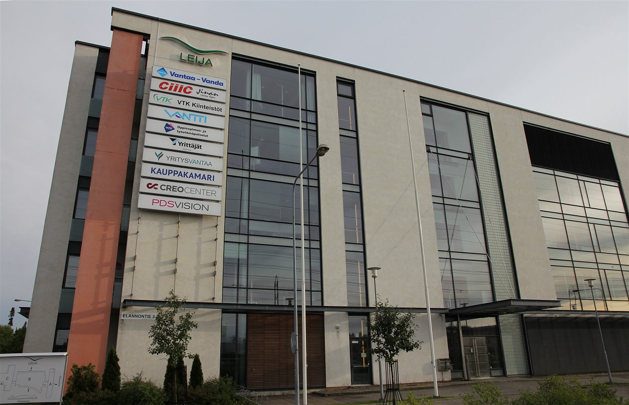 Yrityspalvelukeskus Leija Vantaan Aviapoliksen suuralueen Pakkalan kaupunginosassa, osoitteessa Elannontie 3, 01510 Vantaa.